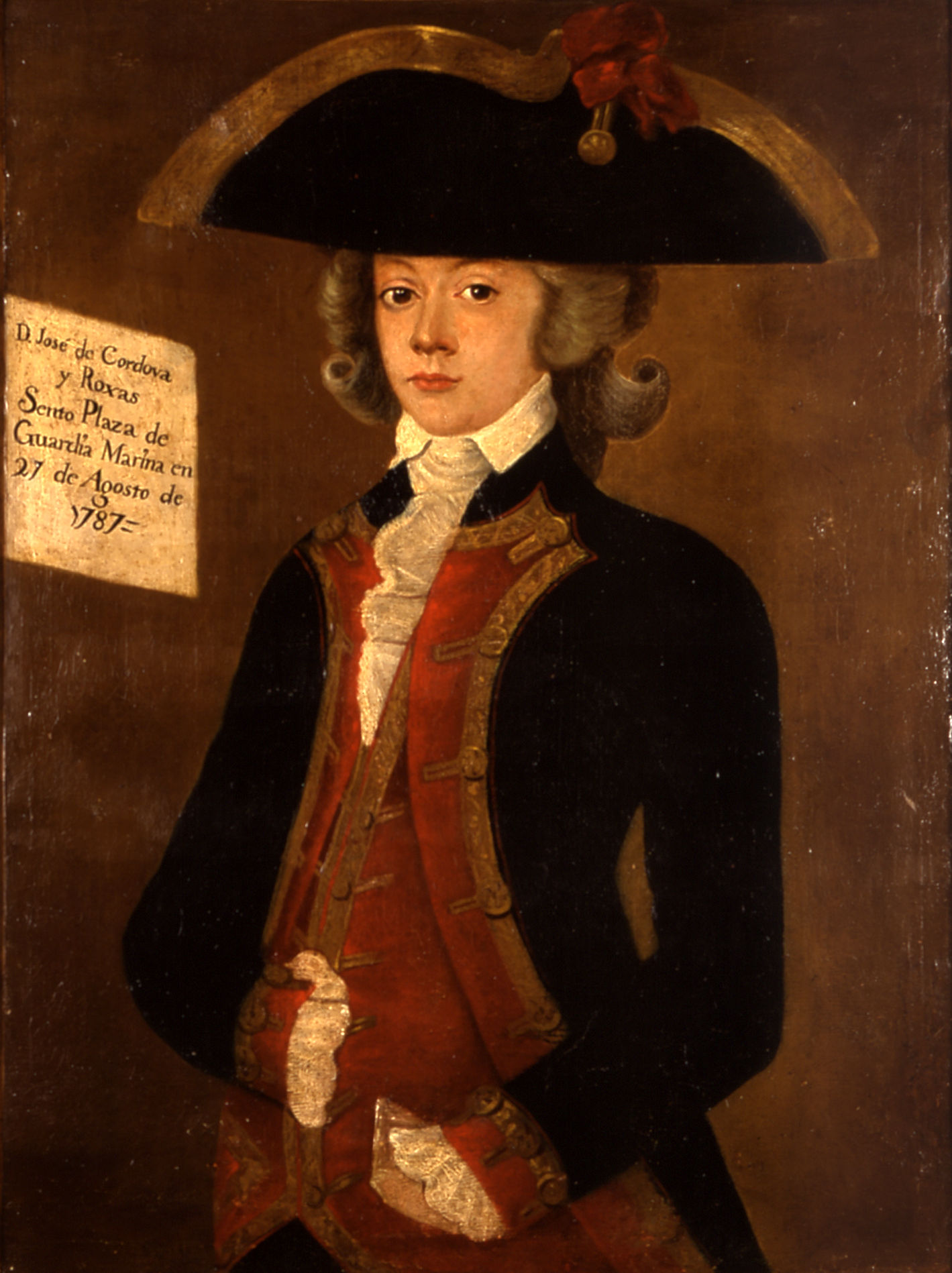 Retrato del marino español José de Córdova y Rojas (1774-1810), que llegó a ser capitán de fragata de la Real Armada Española Murió fusilado en diciembre de 1810 por formar parte de la contrarrevolución a la Revolución de Mayo del Virreinato del Río de la Plata y oponerse a la independencia de esa zona.